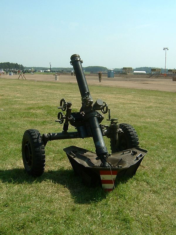 120 mm mortier, in gebruik bij de Nederlandse Koninklijke Landmacht. Landmachtdagen 2005.